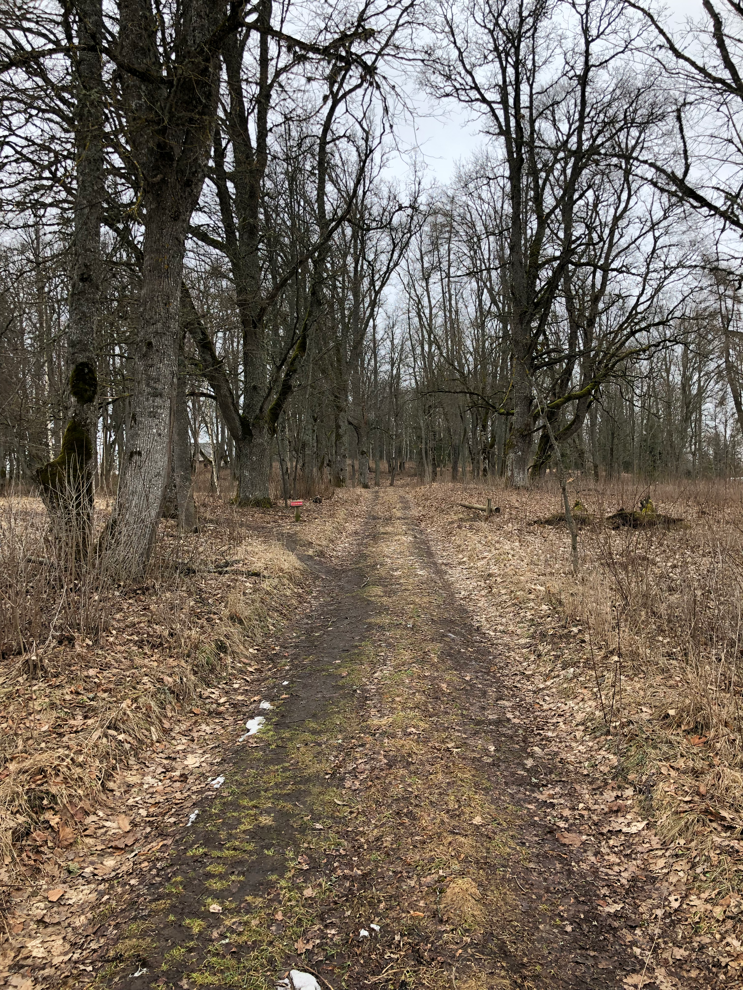 Tas, kas palicis pāri no tā 2019. gadā